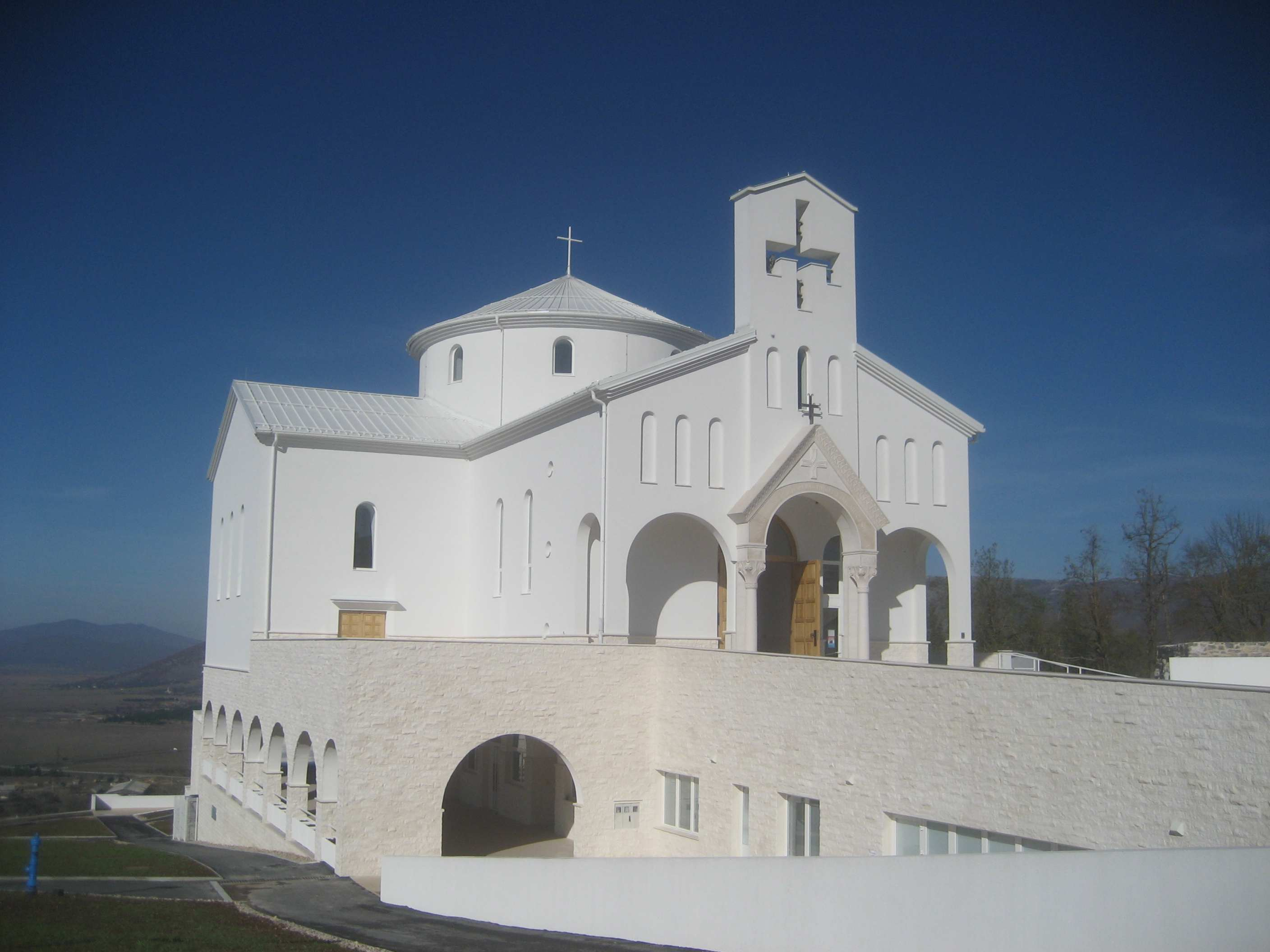 Crkva hrvatskih mučenika na Udbini